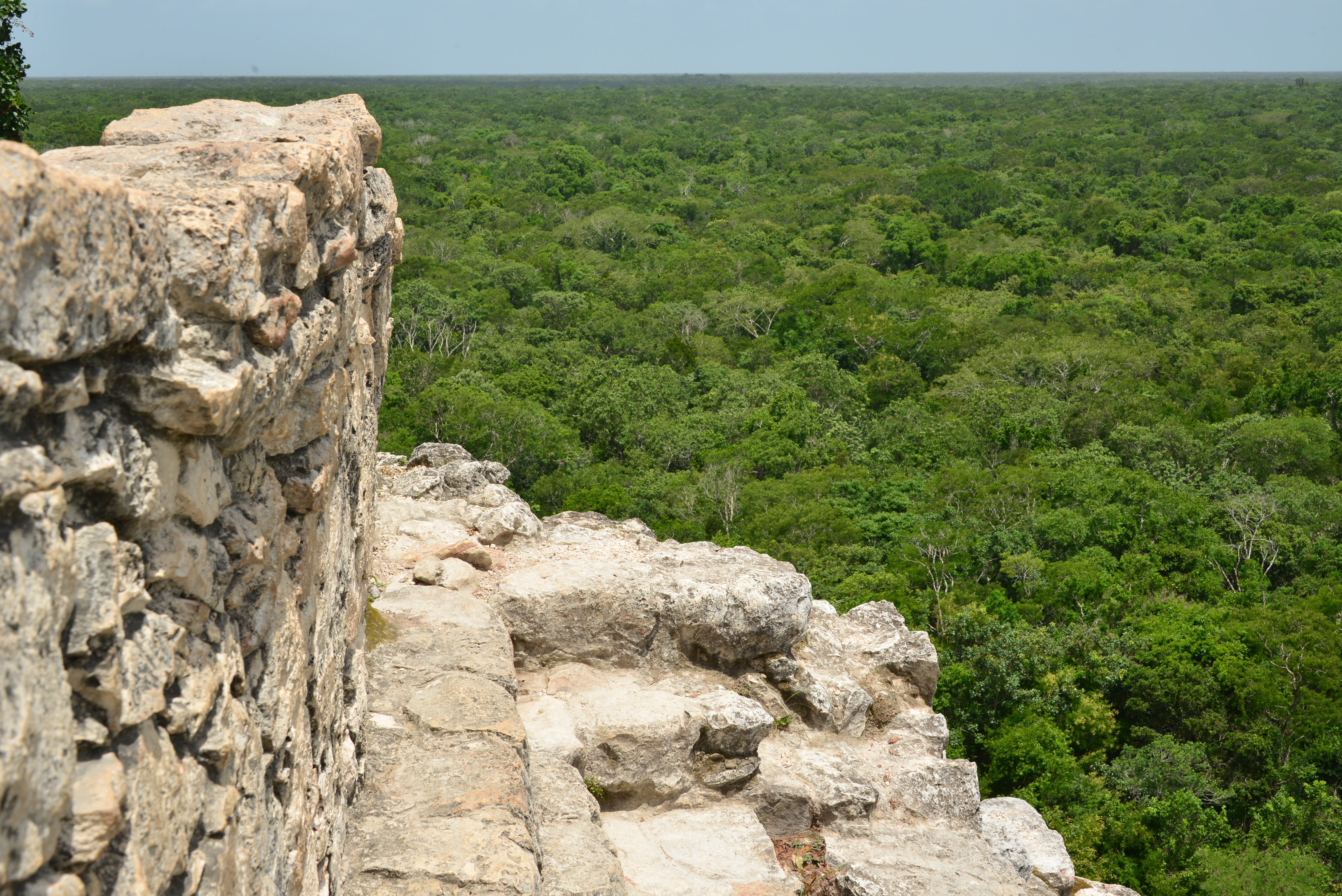 Tulum, Quintana Roo, Mexico